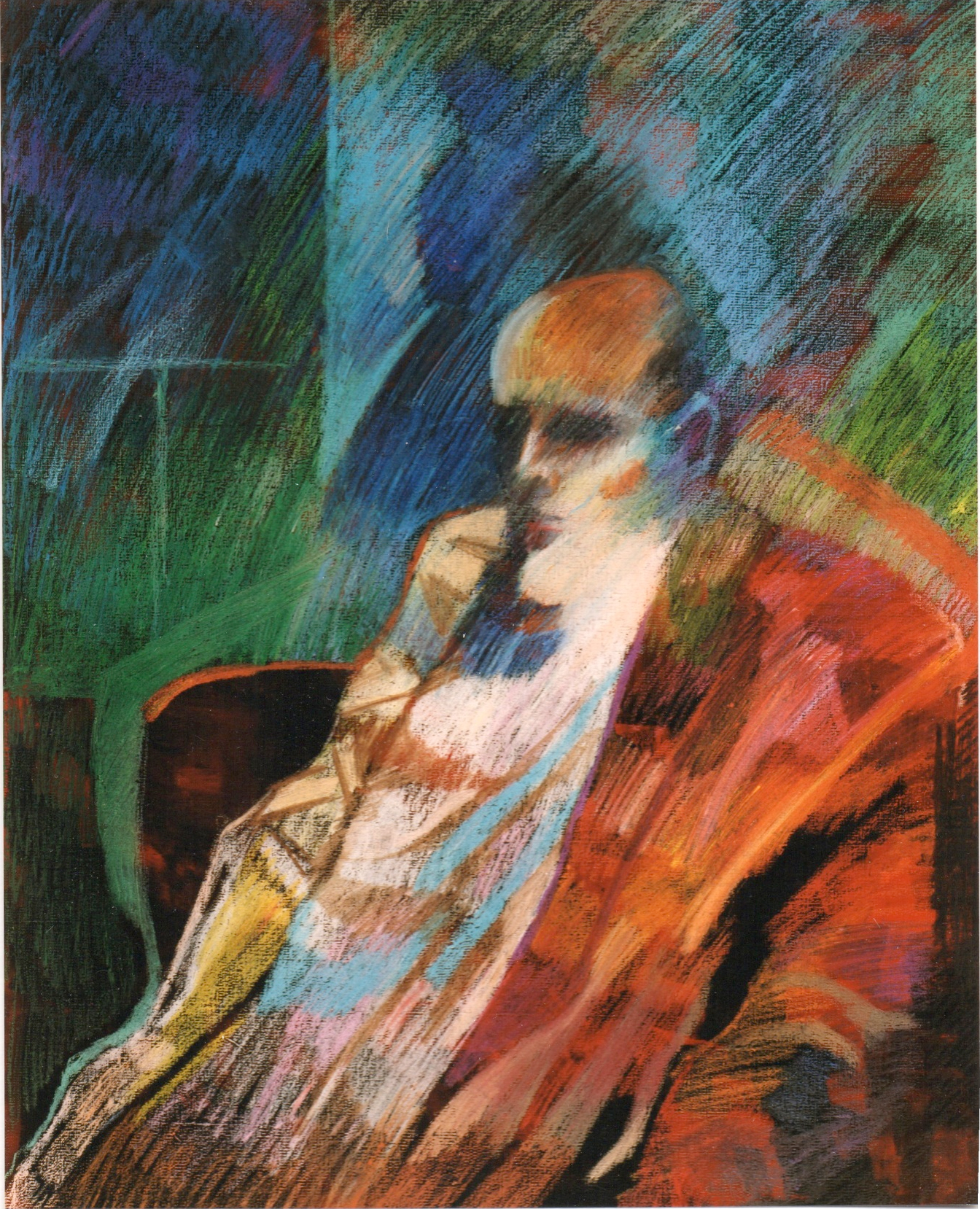 "Sin título", de Enrique Sobisch, 1978